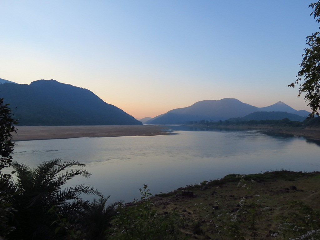 River Mahanadi Tikarpara, Satkosia Tiger Reserve